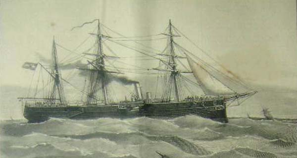 Crucero protegido Velasco (xilografia 1885)